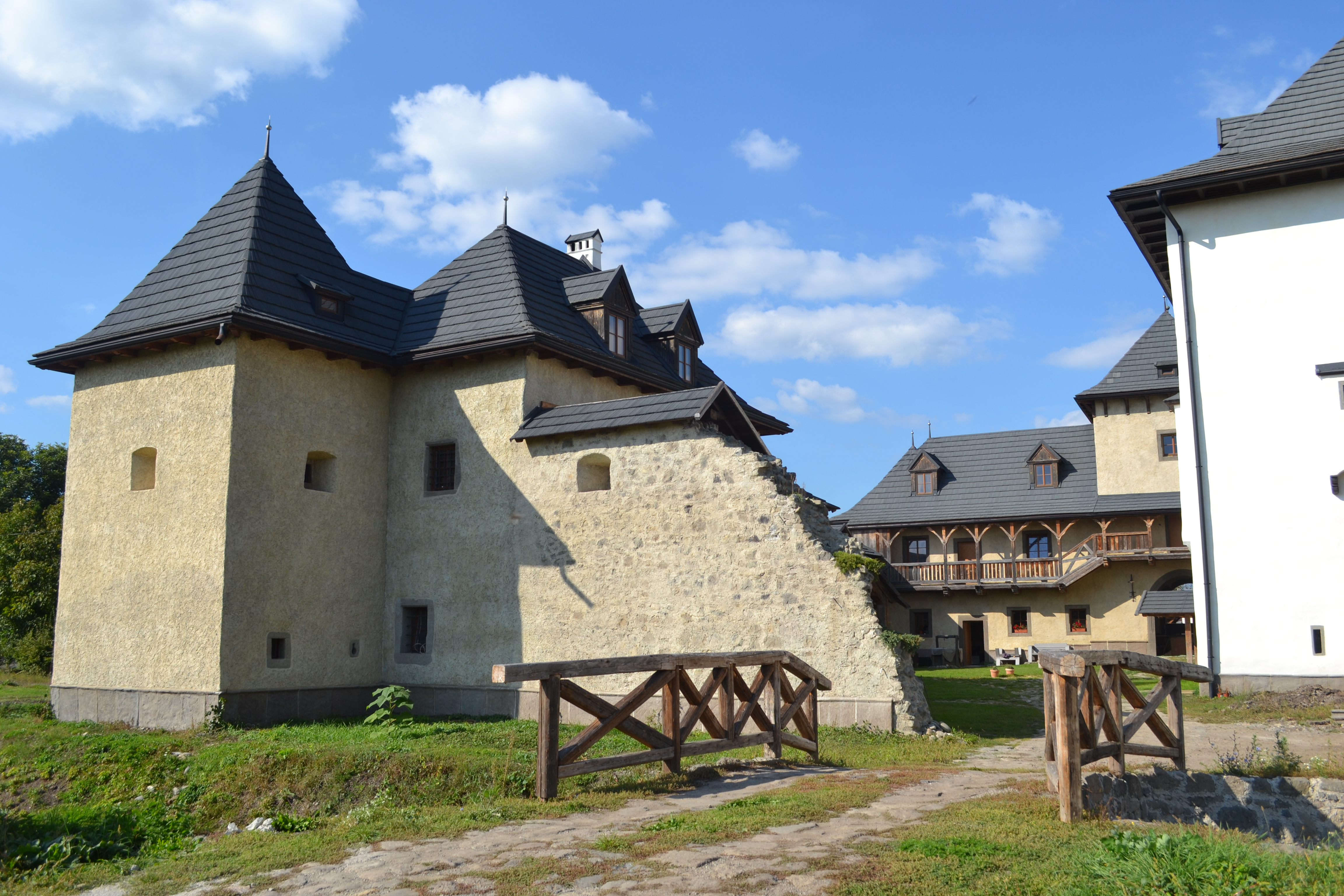 Hronsek, Vodný hrad